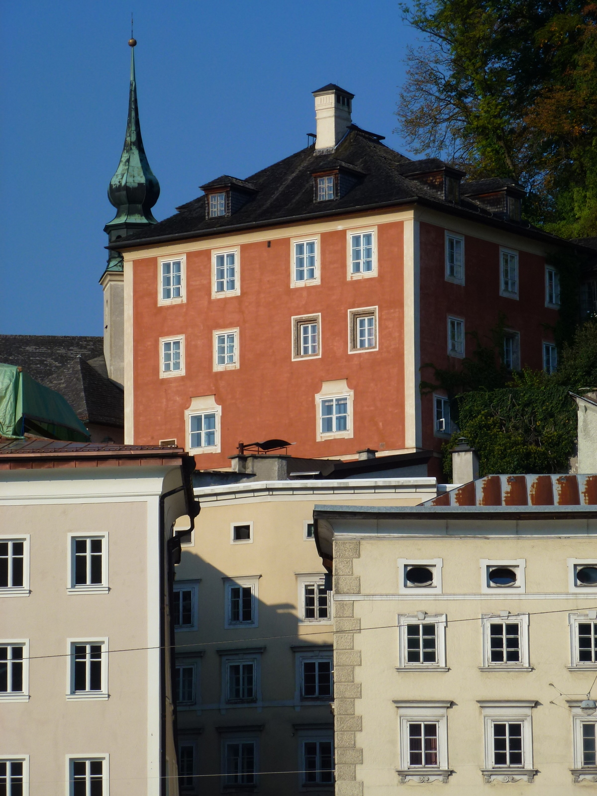 Bürgerhaus, Benefiziatenhaus, Imbergstiege 4, Salzburg